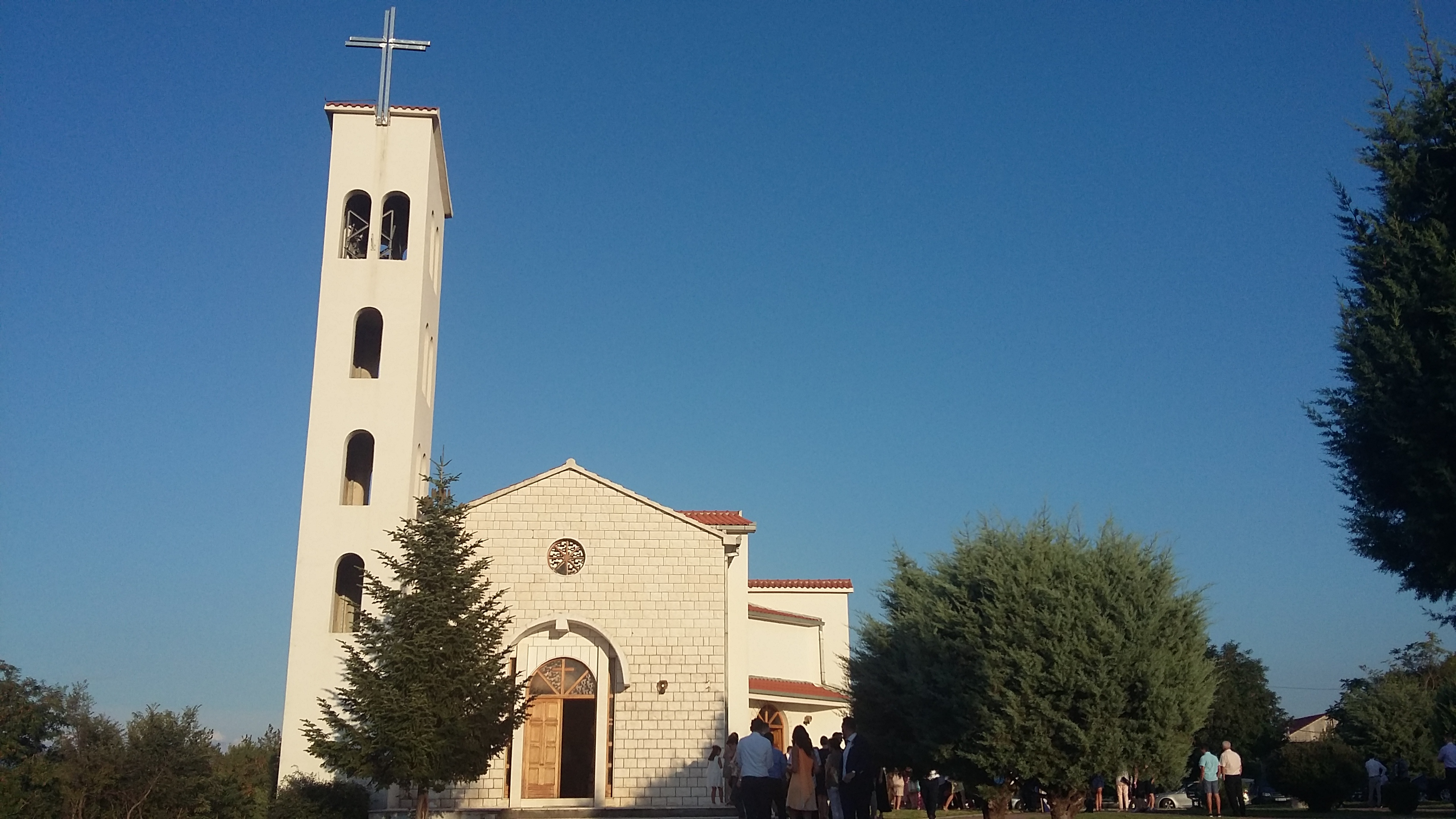 Crkva Kraljice Hrvata